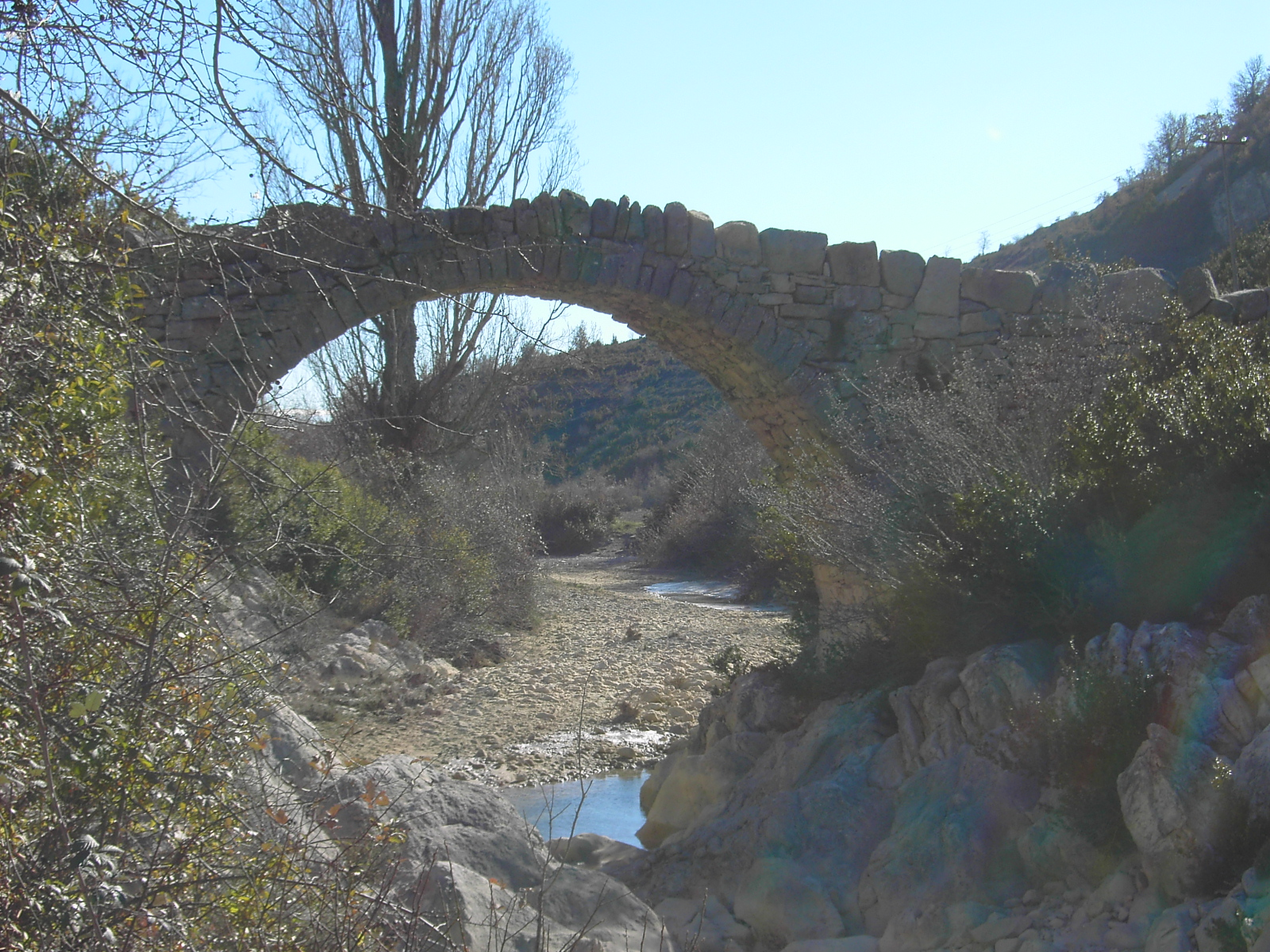 Stone bridge over river Vero, in Sarsa de Surta, Huesca, Spain.